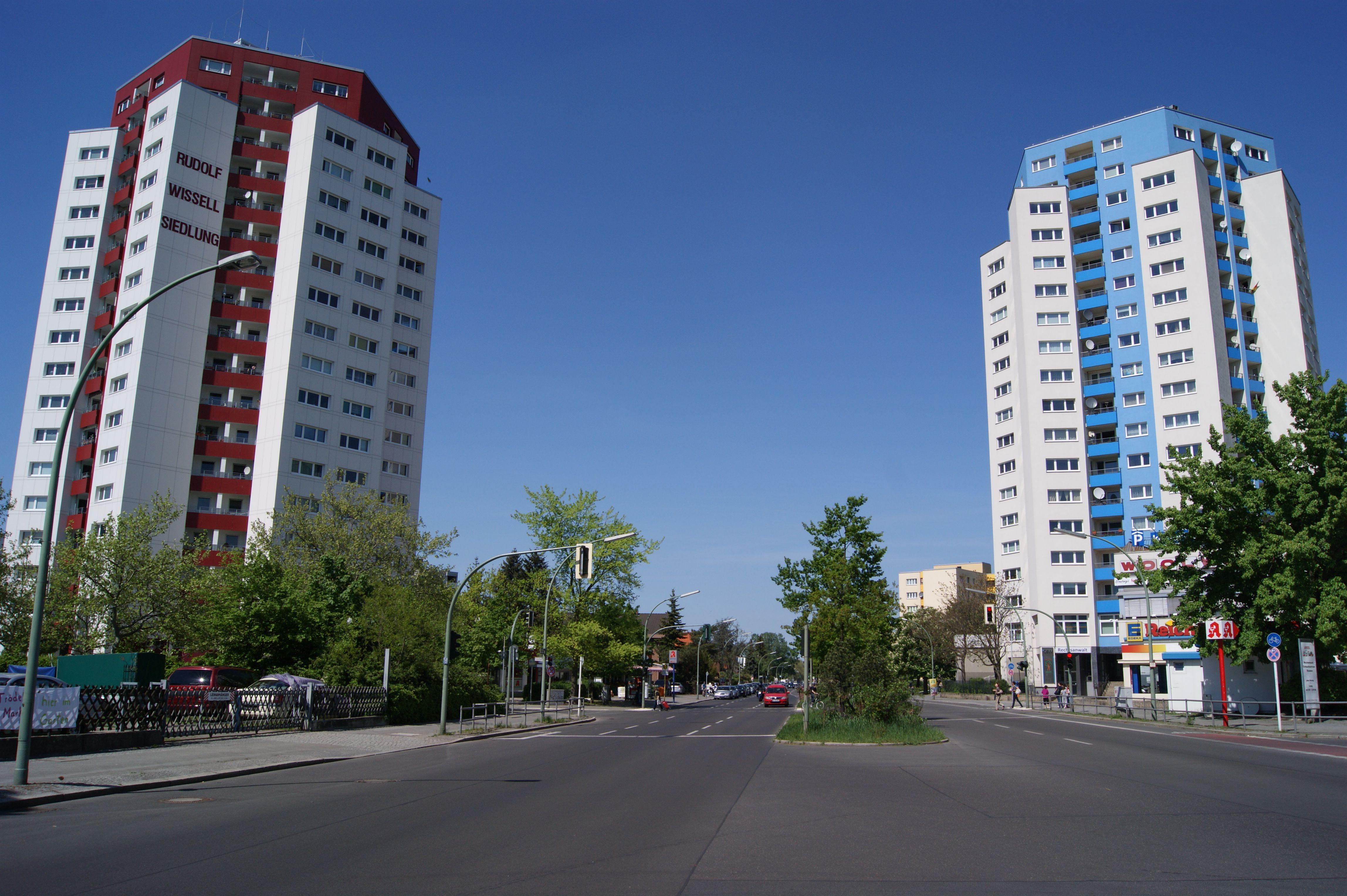 Magistratsweg in Berlin-Staaken